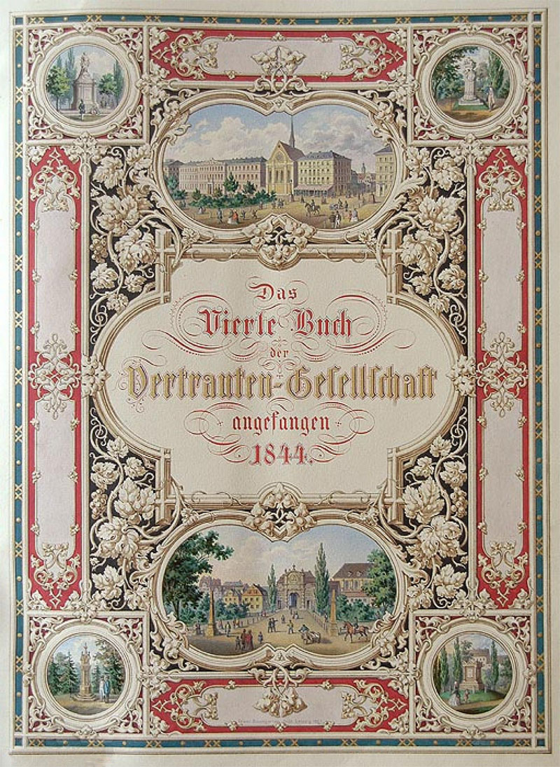 Deckblatt eines Vereinsbuches der Vertrauten Gesellschaft Leipzig mit Abbildungen vom Augustusplatz, dem Peterstor, dem Friedrich-August-Denkmal, dem Oeser-Denkmal , dem Bach-Denkmal und dem Müller-Denkmal